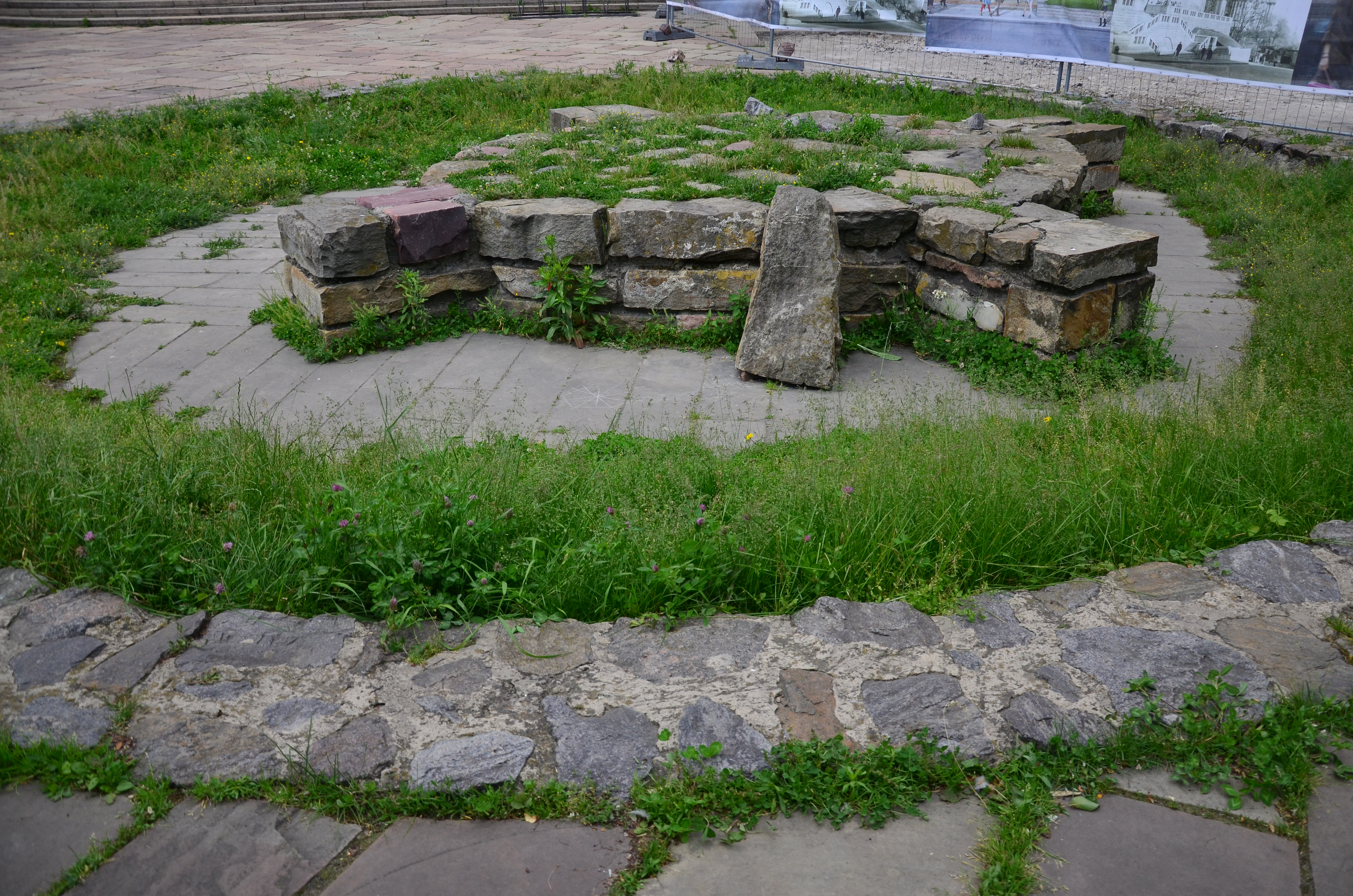 Язичницьке капище по вулиці Володимирській, 2 у Києві. Пам'ятка VII — I пол. Х ст.